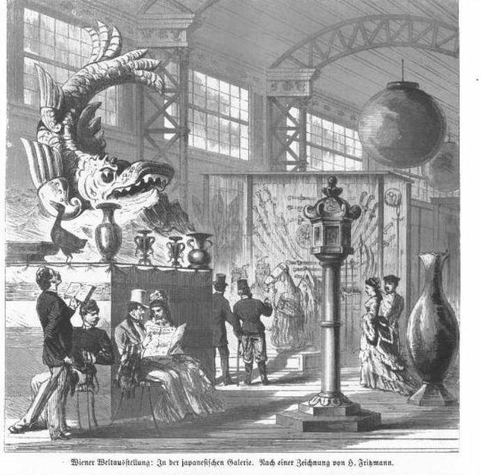 expo 1873 Ausstellung Japan